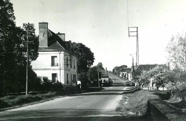 Carte postale représentant la poste et la route nationale à Nouans-les-Fontaines.